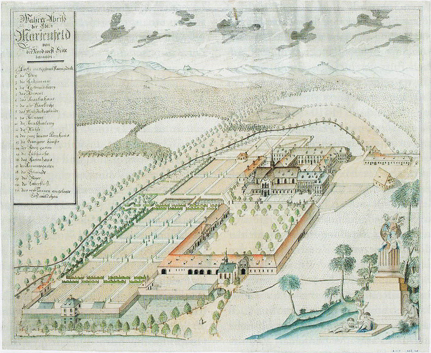 Ansicht des Klosters Marienfeld von 1802